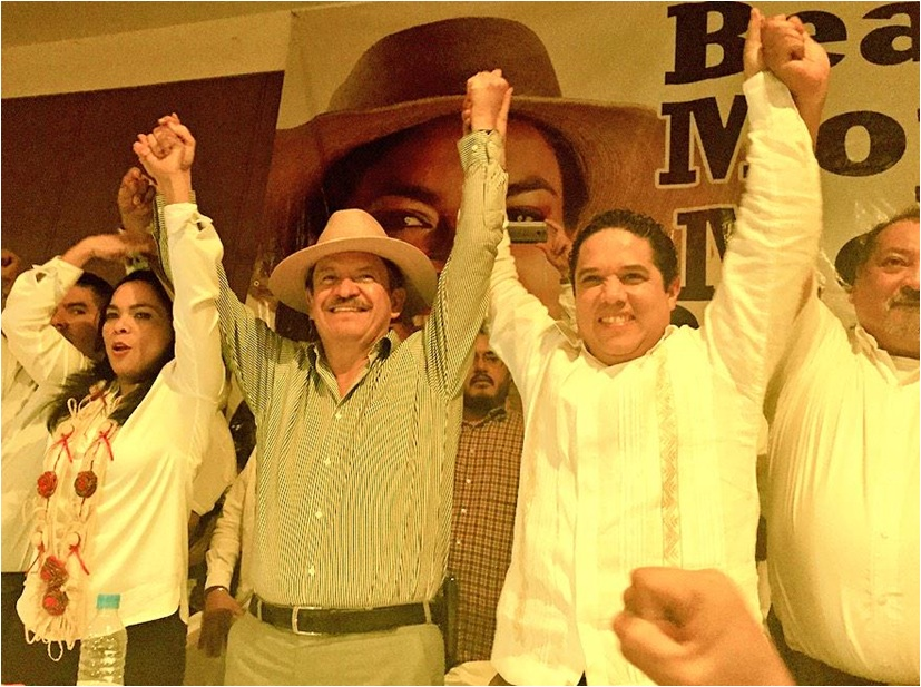 Evodio Velázquez, Carlos Navarrete y Beatriz Mojíca